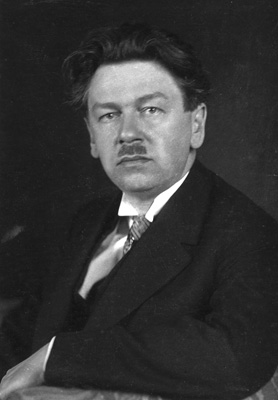 Antonín Engel (1879 - 1958), Český architekt.